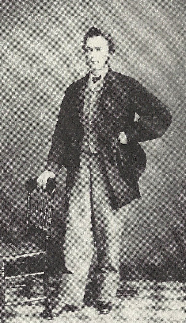 Carl Böschen in den 1850-er Jahren